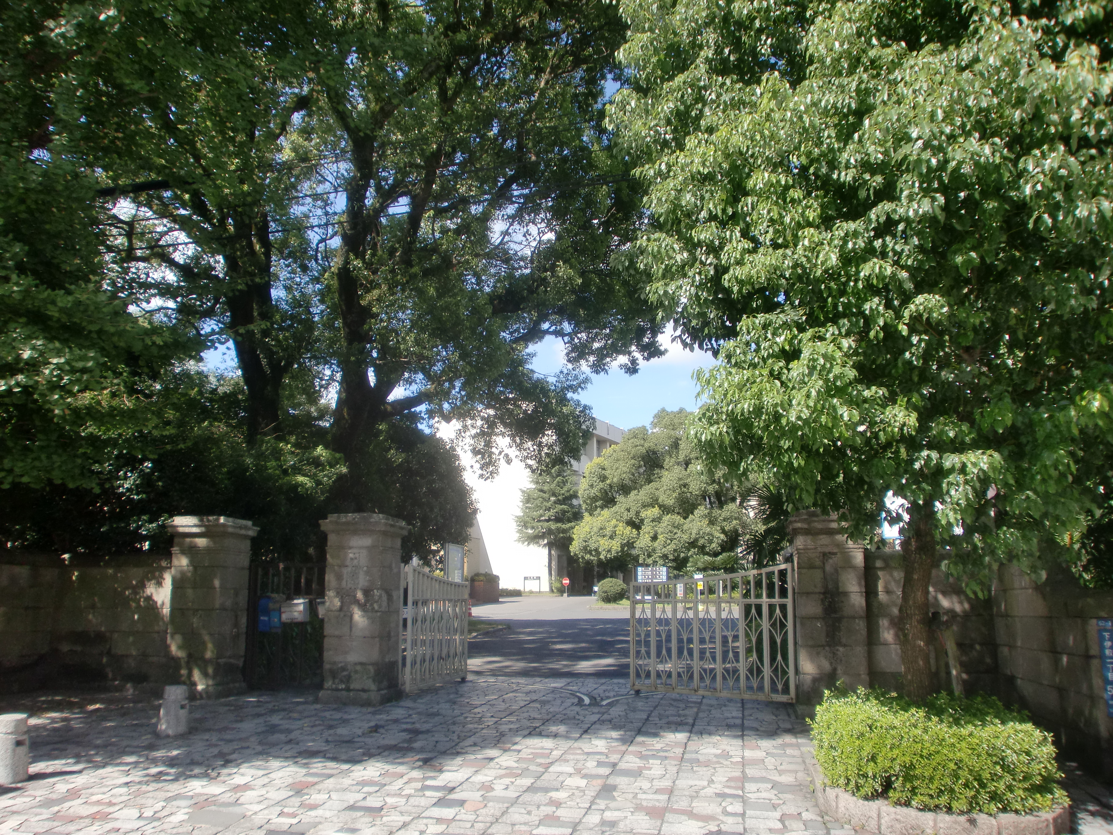 鹿児島県立短期大学の外観。